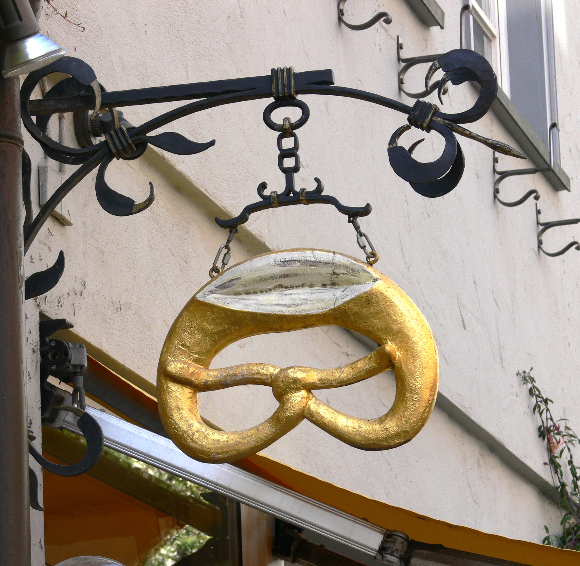 Ravensburg, Ladenschild einer Bäckerei in der Eichelstraße